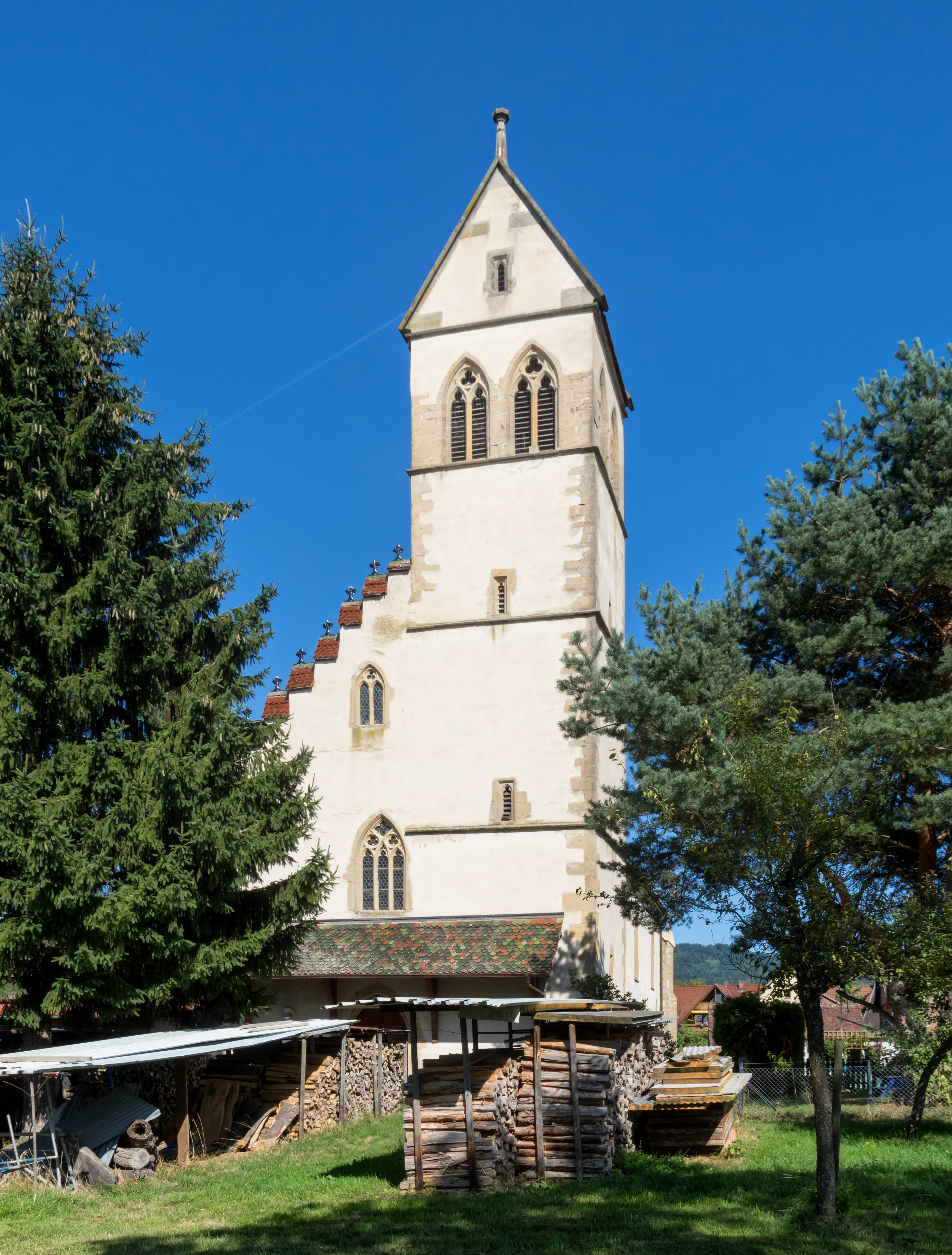 St. Aegidien in St. Ilgen einem Teilort von Laufen Außenansichten